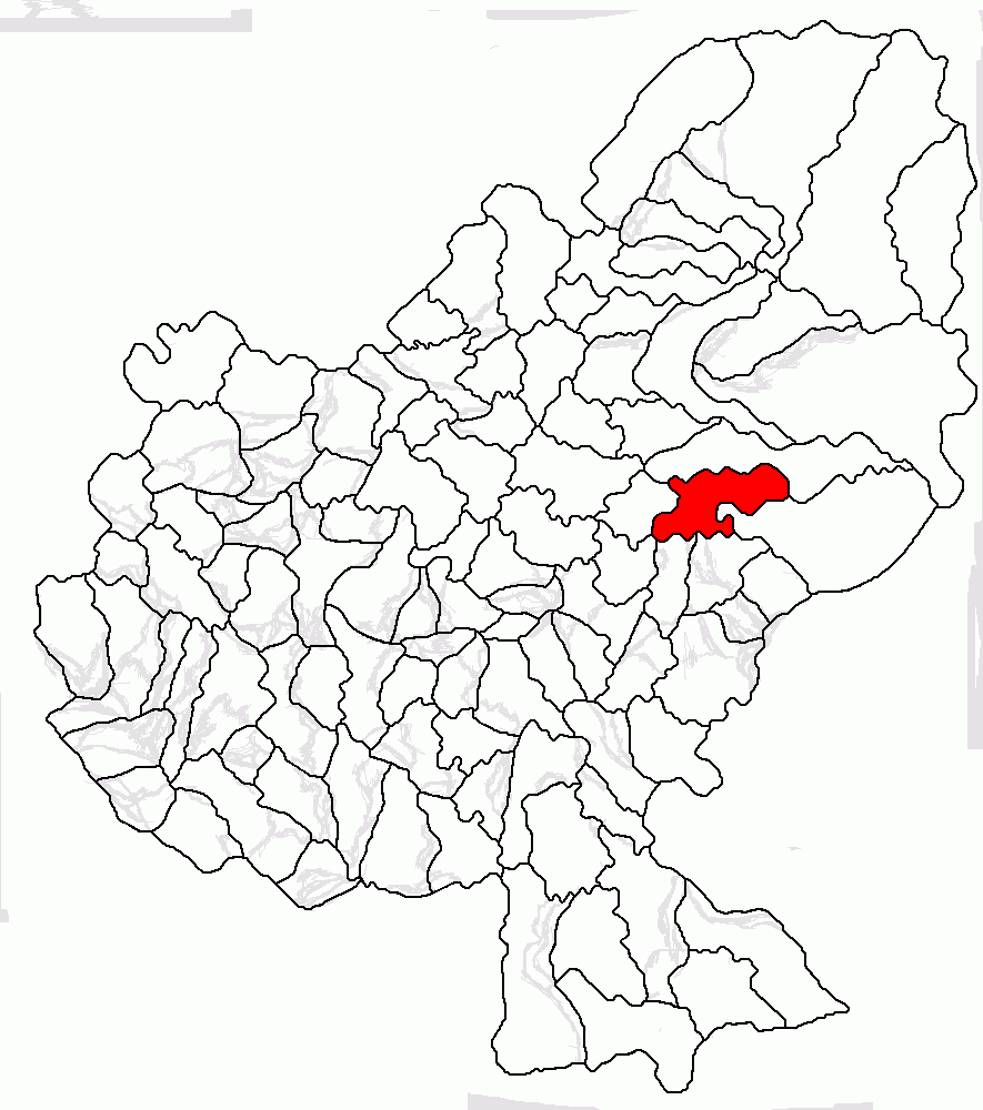 Categorie:Hărţi ale judeţului Mureş